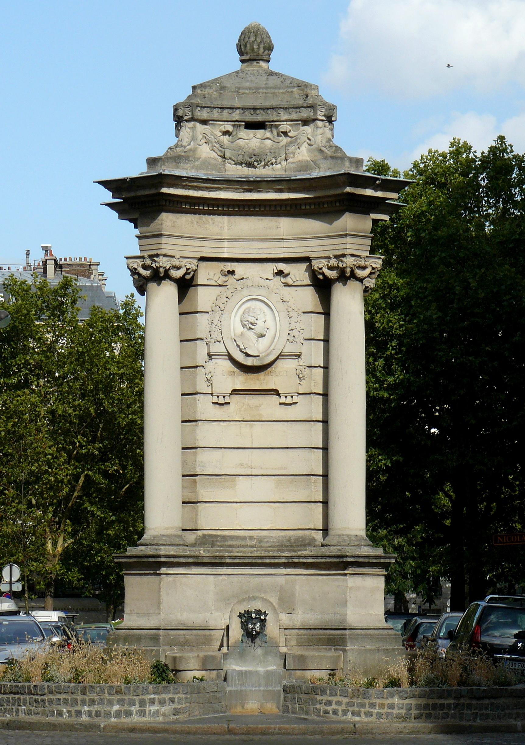 Fontaine du Puits de Grenelle - Paris 15ème arrondissement. Place Georges Mulot